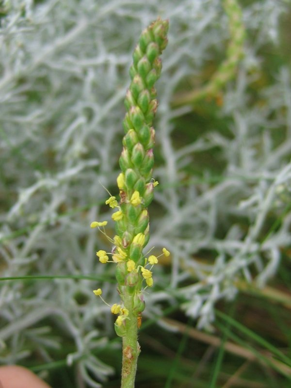 Ähre des Strand-Wegerichs Plantago maritima, Wismarbucht